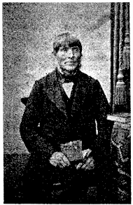 Fotografi va 1860